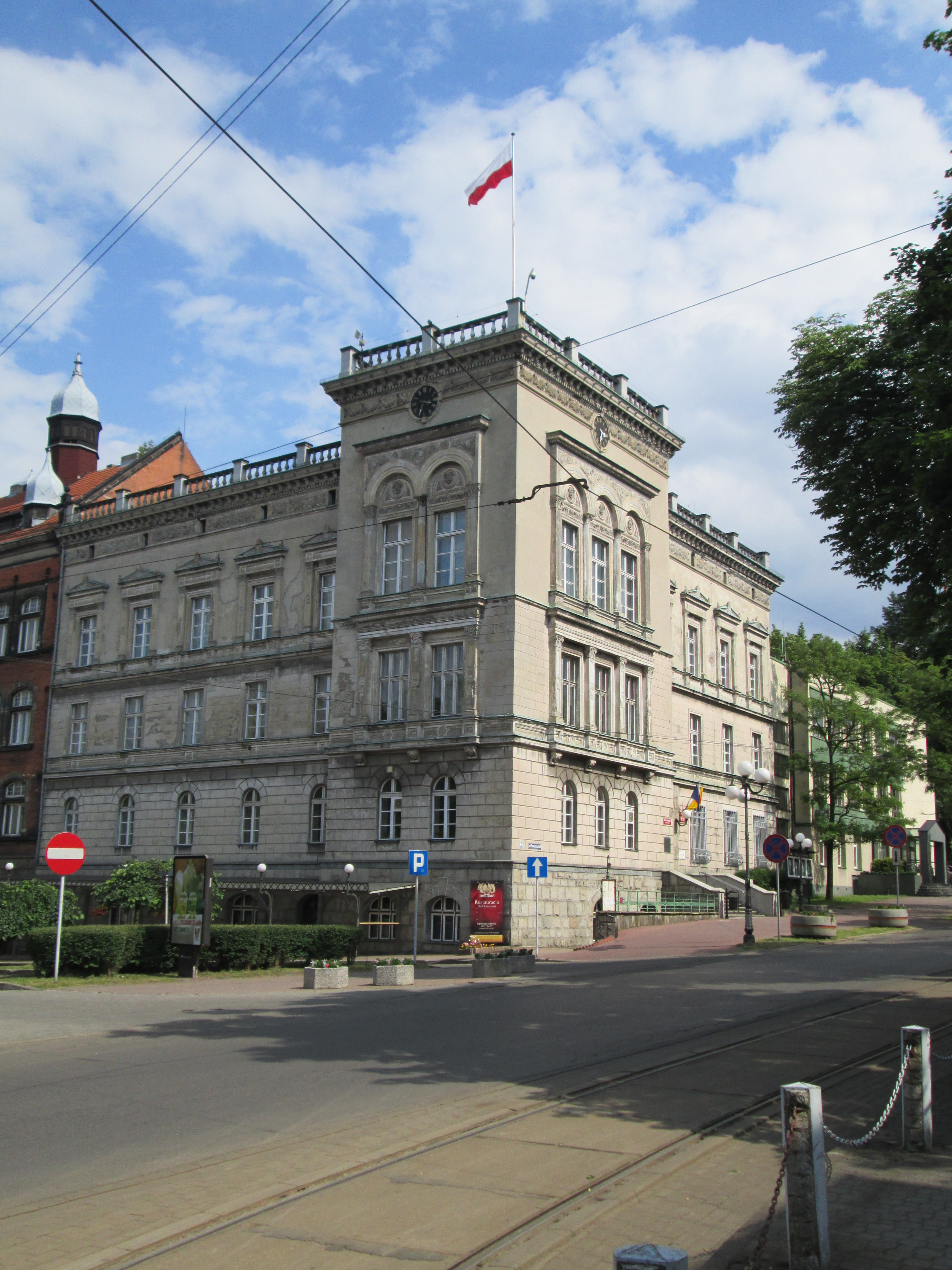 Mysłowice, budynek (obecnie siedziba Urzędu Miejskiego)